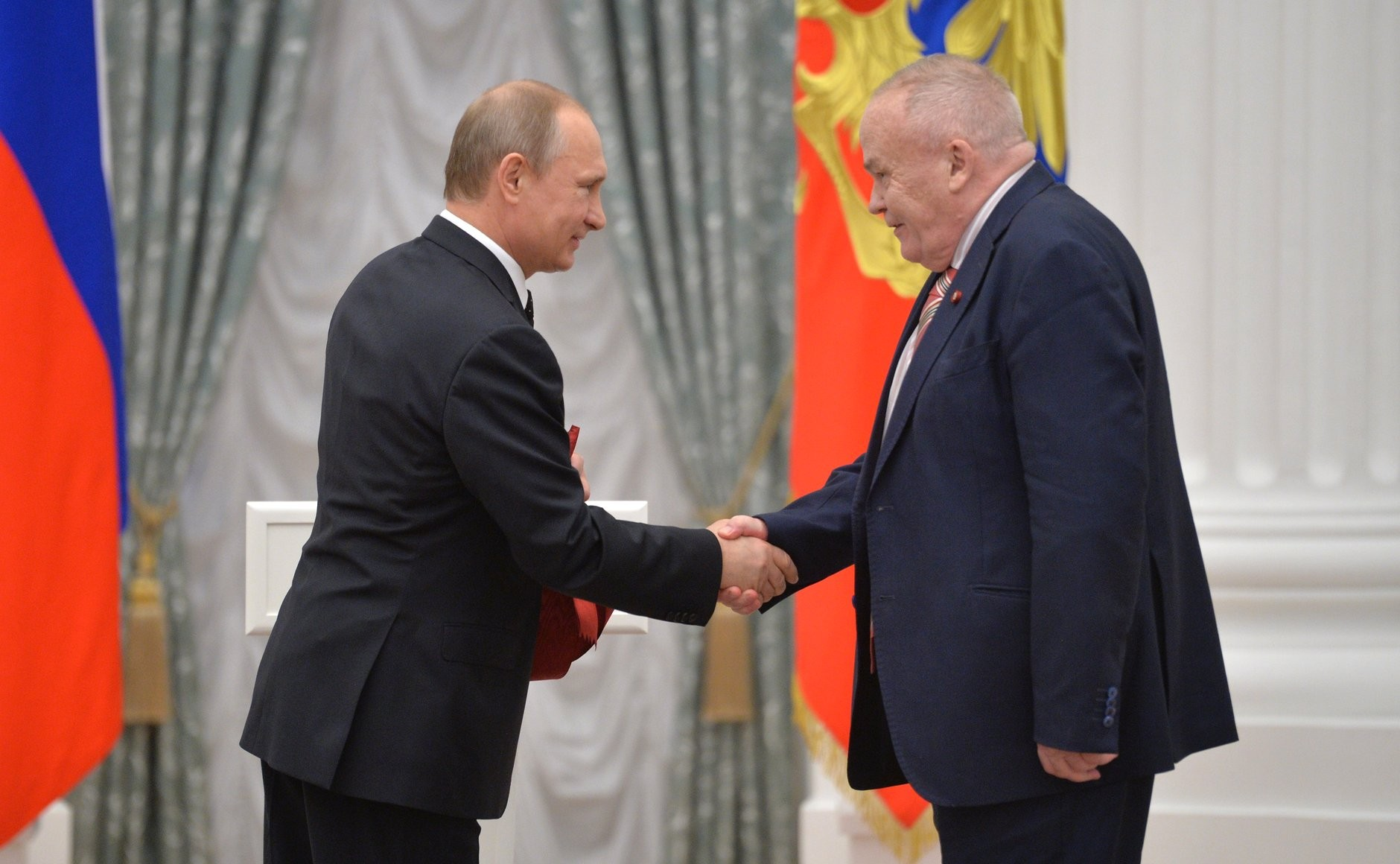 Церемония вручения государственных наград Российской Федерации. Президент Национального исследовательского центра «Курчатовский институт» Евгений Велихов награждён орденом «За заслуги перед Отечеством» I степени